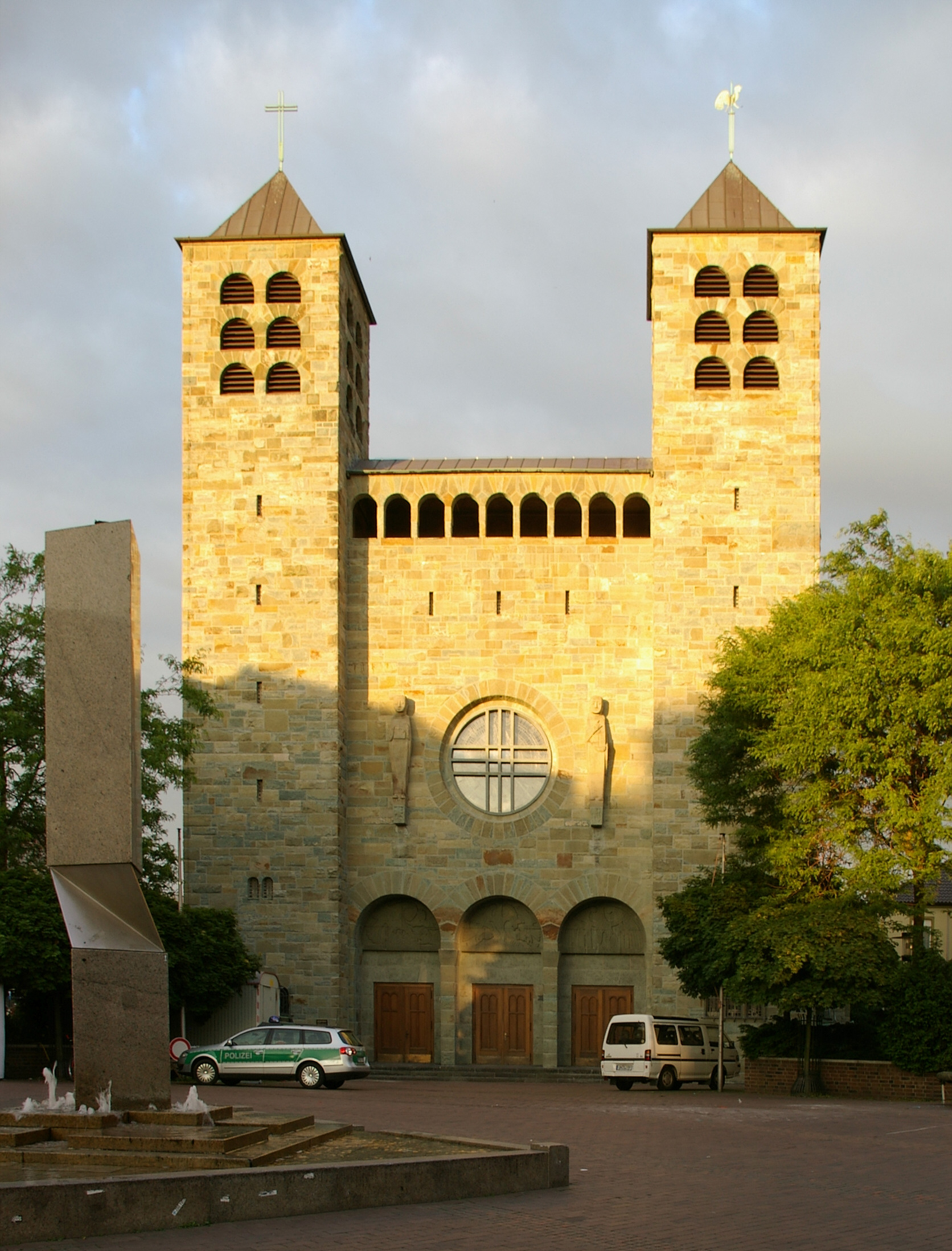 Die Katharinenkirche in Unna, Nordrhein-Westfalen, in der Abendsonne. Heiligenfiguren und Portalgestaltung von Josef Baron. Brunnen mit Skulptur von Carlernst Kürten